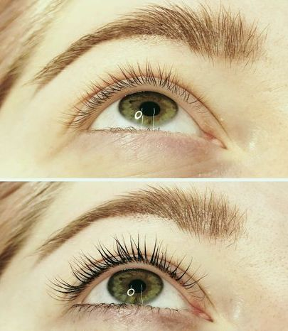 Результаты ламинирования ресниц, выполненного в салоне RudkoArtline, Киев